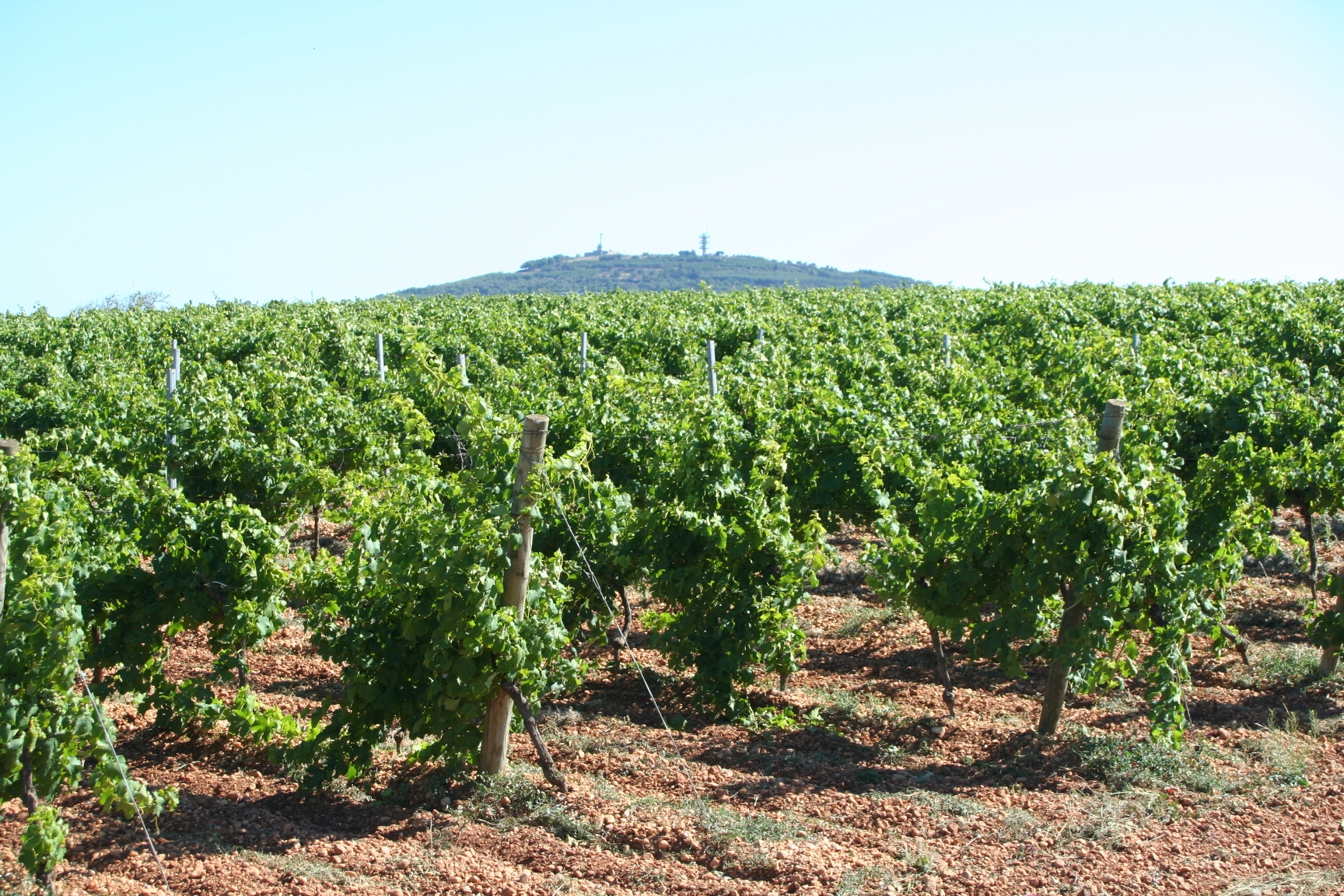 Vignoble à Agde (Hérault, France)